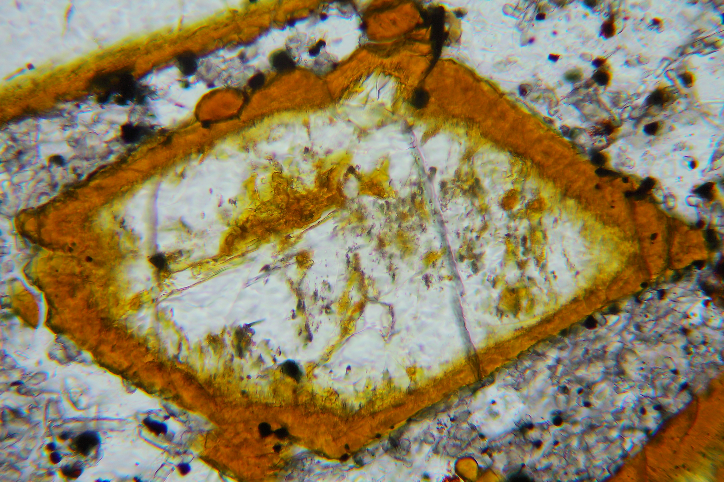 Olivinkristall mit Iddingsitrand (braun), Vogelsberg